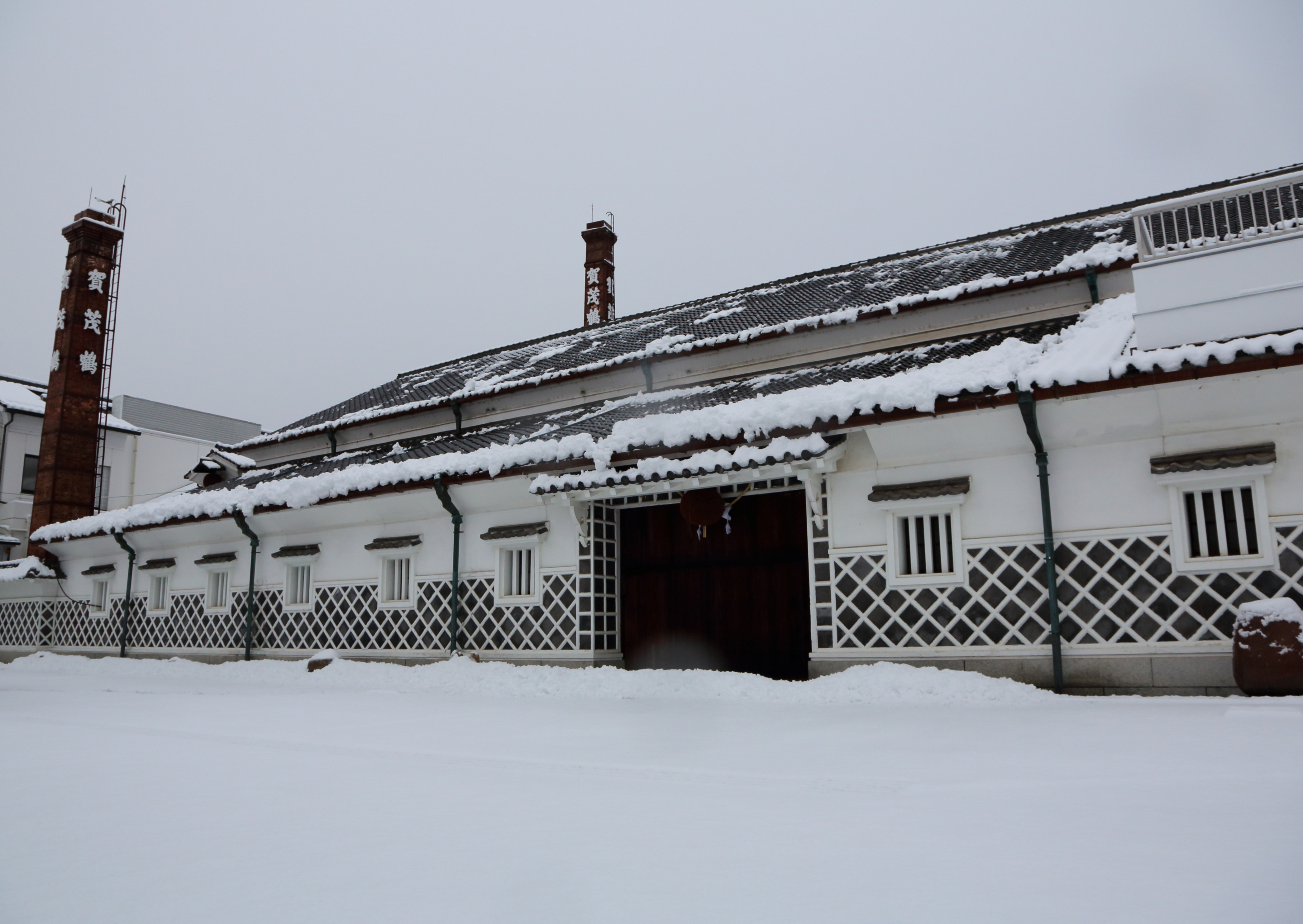 雪の朝（西条町、2013年1月）